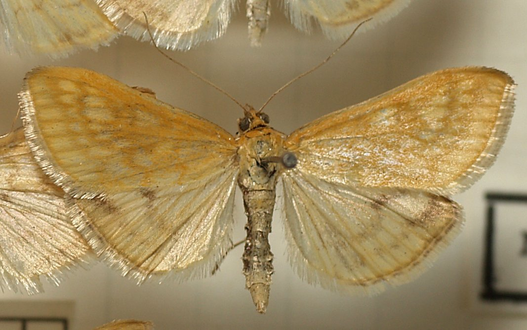 Paratalanta pandalis